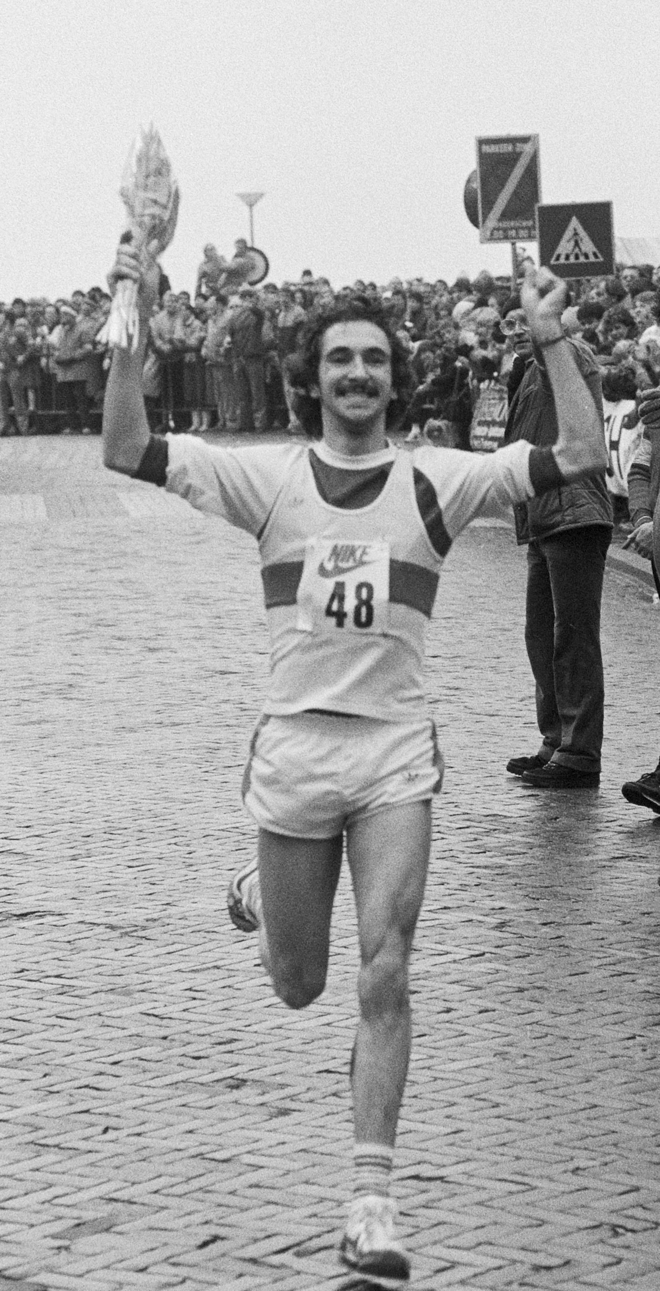 Halve marathon in Egmond aan Zee; Aankomst van winnaar Marti ten Kate.